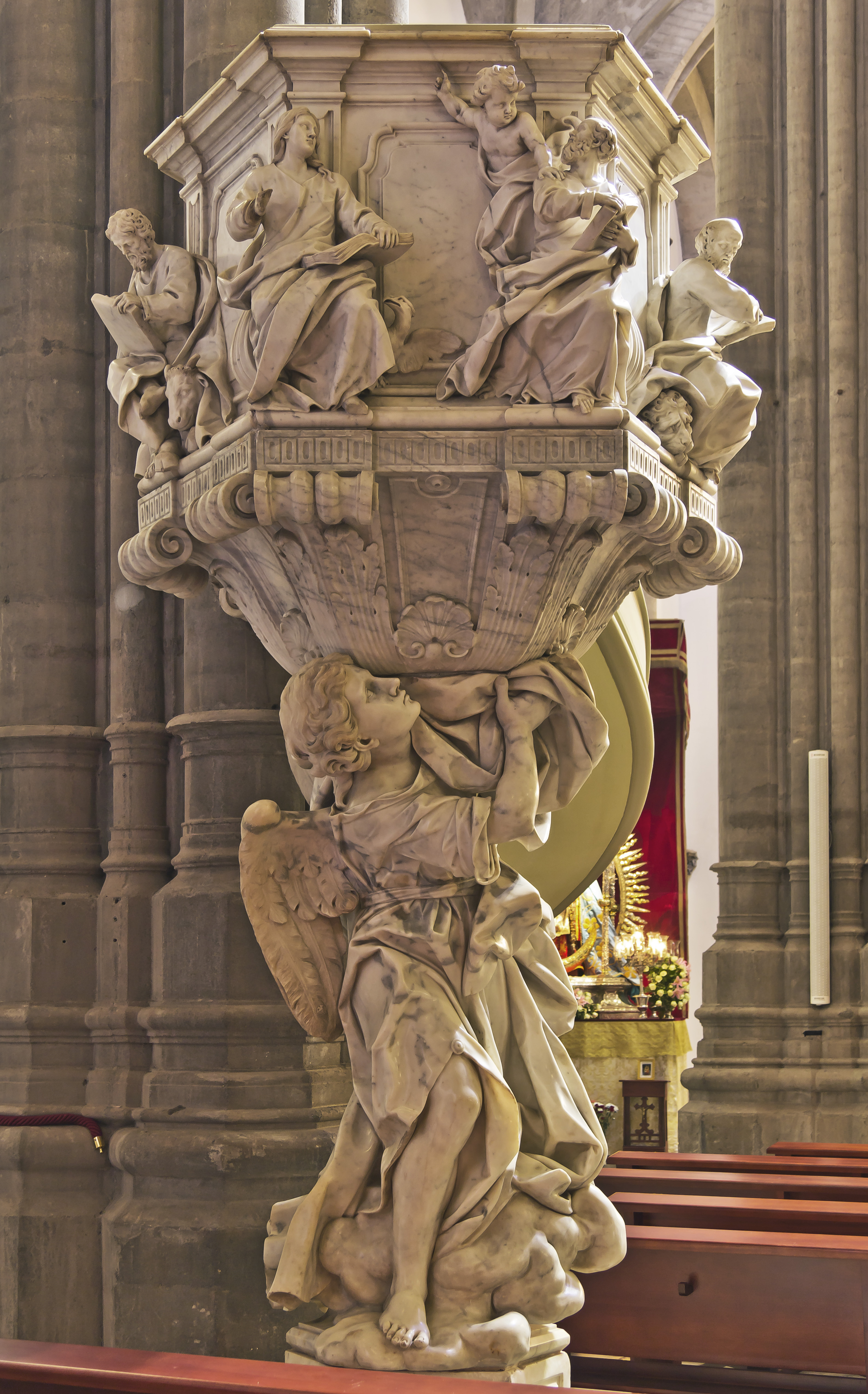 Kanzel des Künstlers Pasquale Bocciardo in der Kathedrale in La Laguna